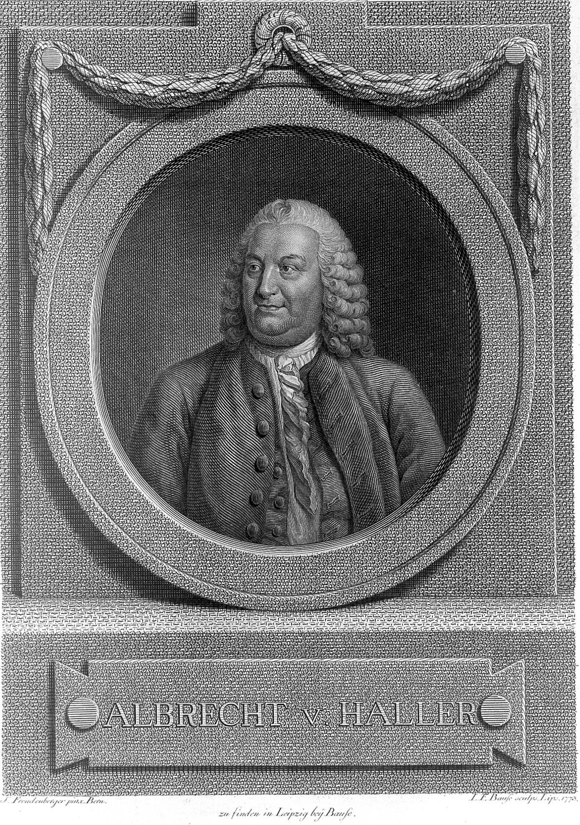 Baron Albrecht von Haller. Line engraving by J. F. Bause, 1773, after S. Freudenberger, 1773. Wellcome Images Keywords: Albrecht von Haller; Sigmund Freudenberger; J. F. Bause